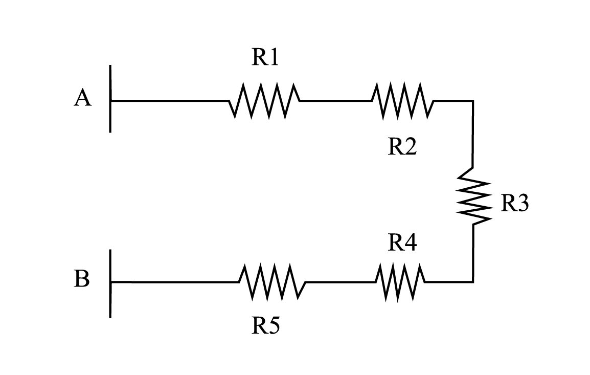 Resistor in a series from point A to point B, where each resistors end hand is the beginning hand of another resistor.